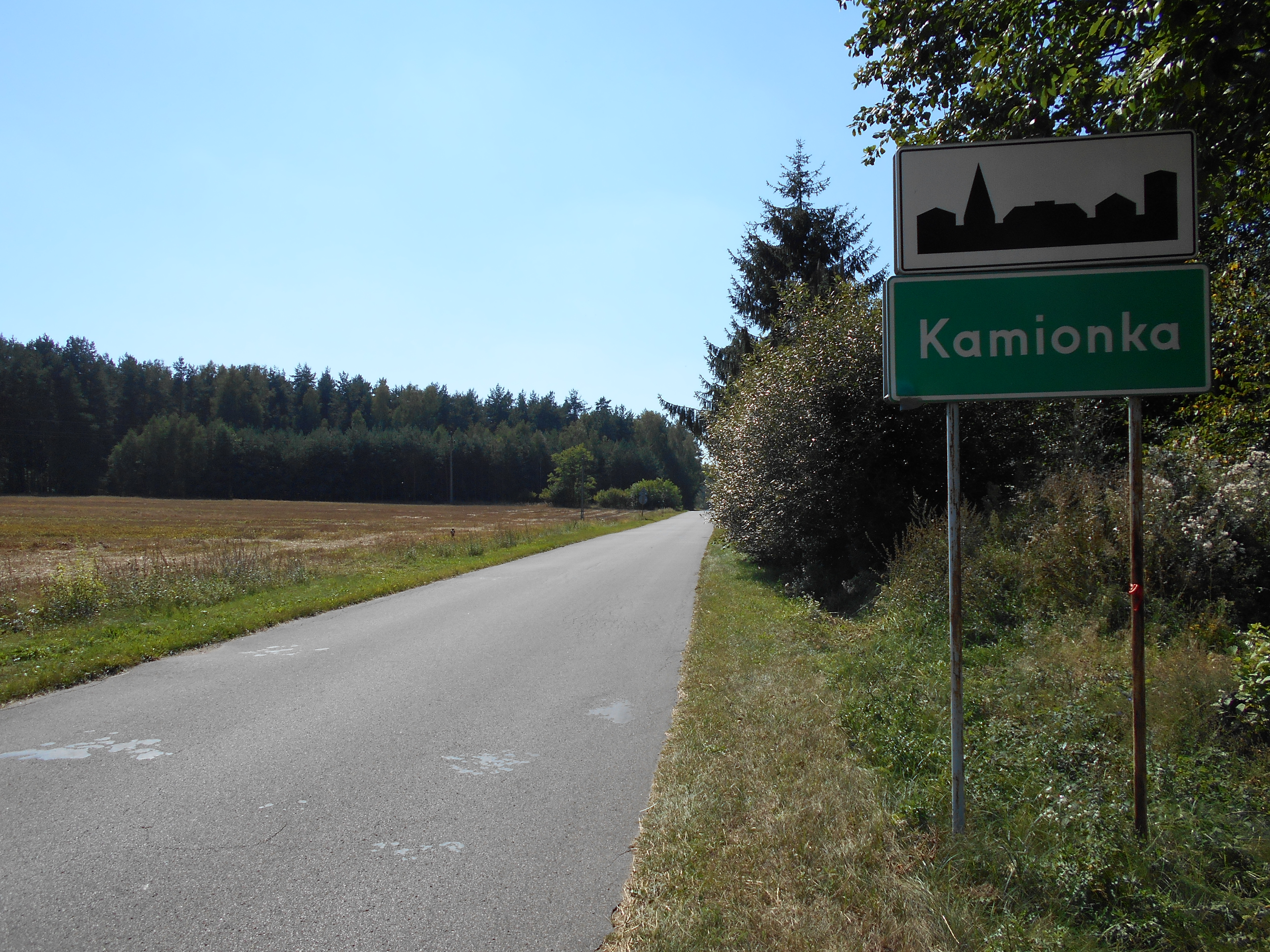 Miejscowość w gminie Jakubów